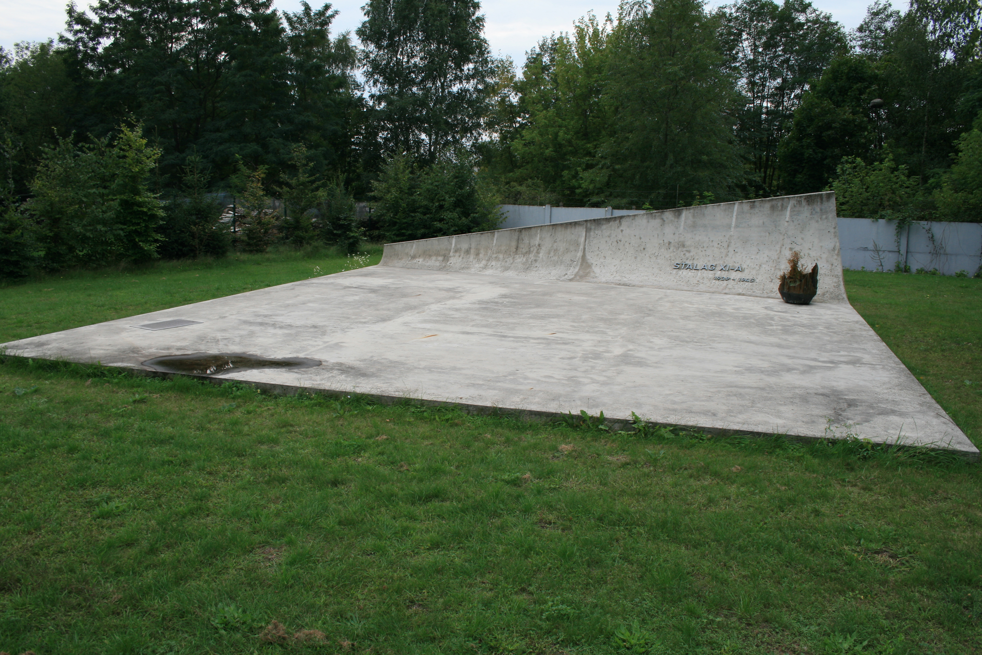 Zufahrt zum Truppenübungsplatz von Altengrabow